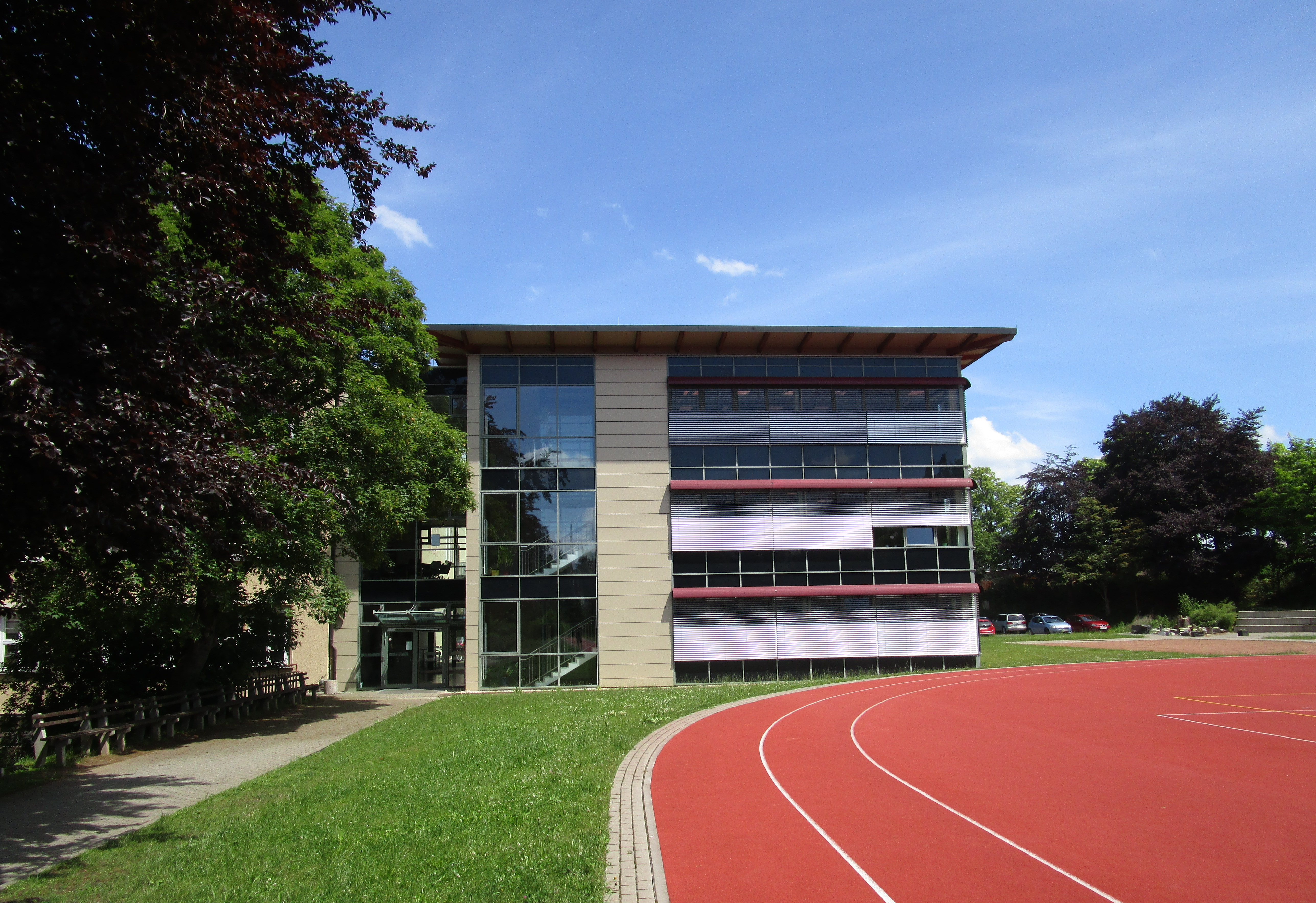 Neubau des Johann-Heinrich-Pestalozzi-Gymnasiums Rodewisch